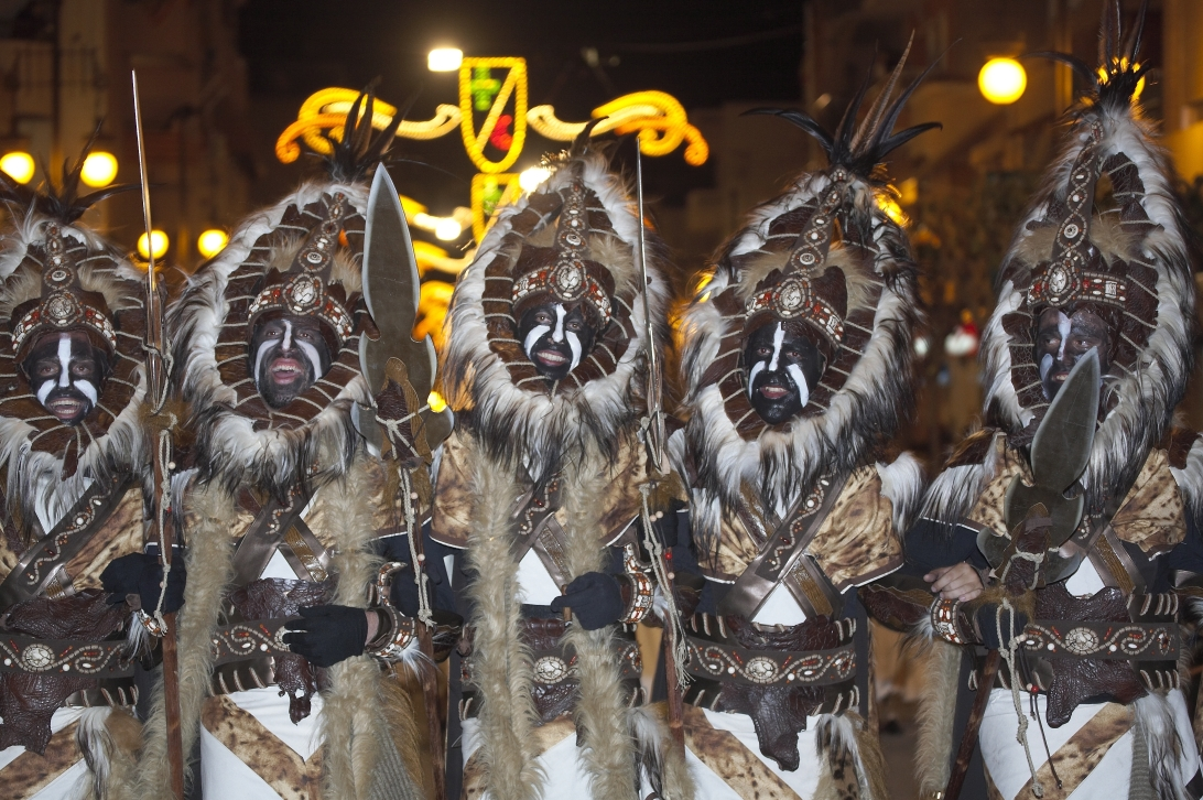 Entrada mora en las fiestas de Moros y Cristianos de 2006 en Campello (provincia de Alicante, España).